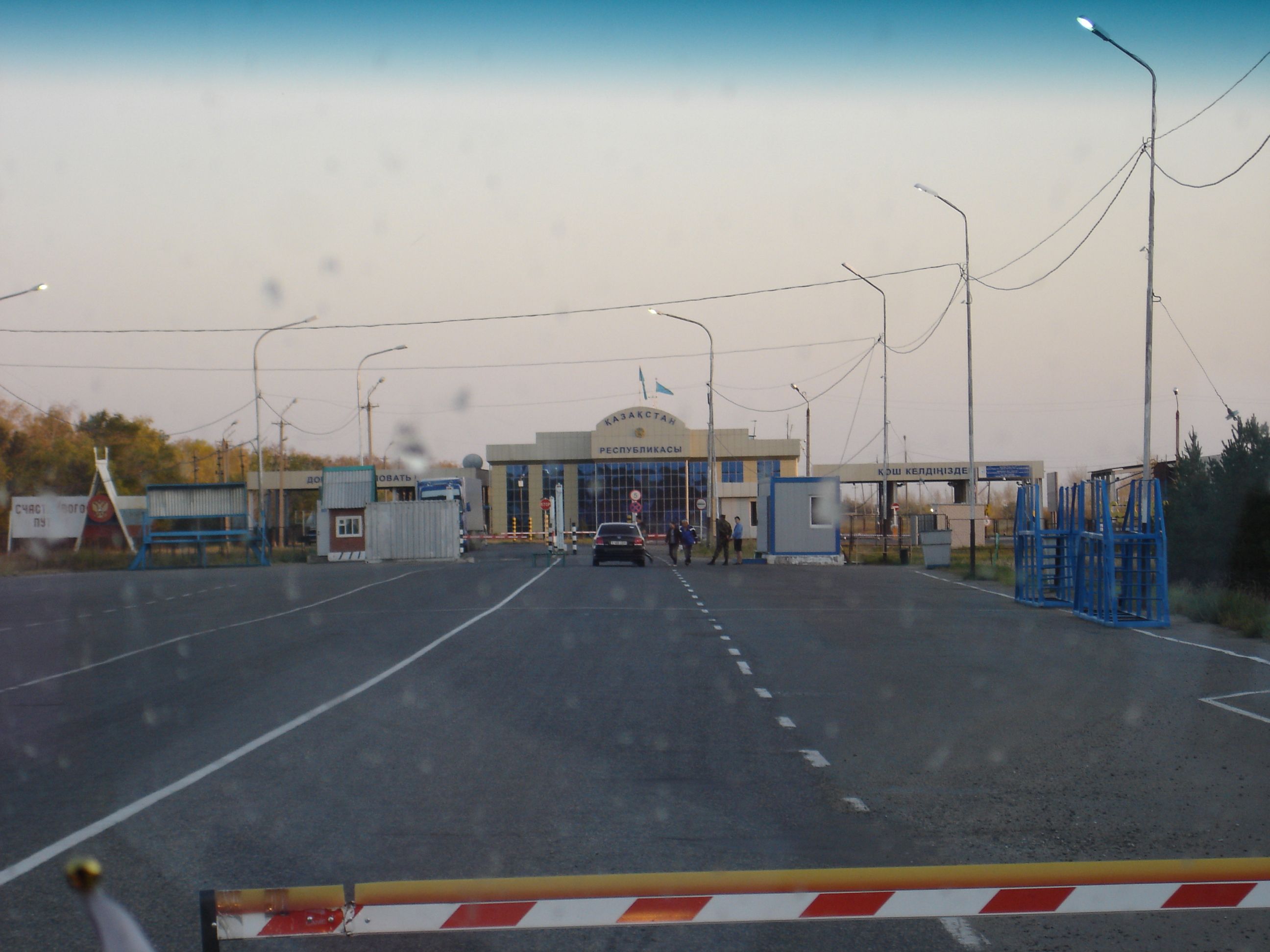 КПП Орлю-Тобе, российско-казахская граница. Вид со стороны российского КПП.